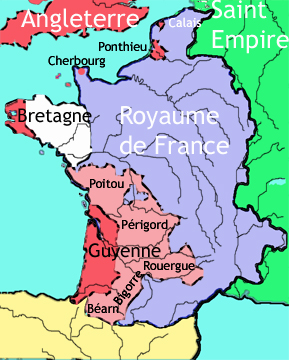 En rouge : territoires contrôlés par Édouard III. En rouge pâle : territoires cédés par la France à l'Angleterre en vertu du traité de Brétigny en 1360.